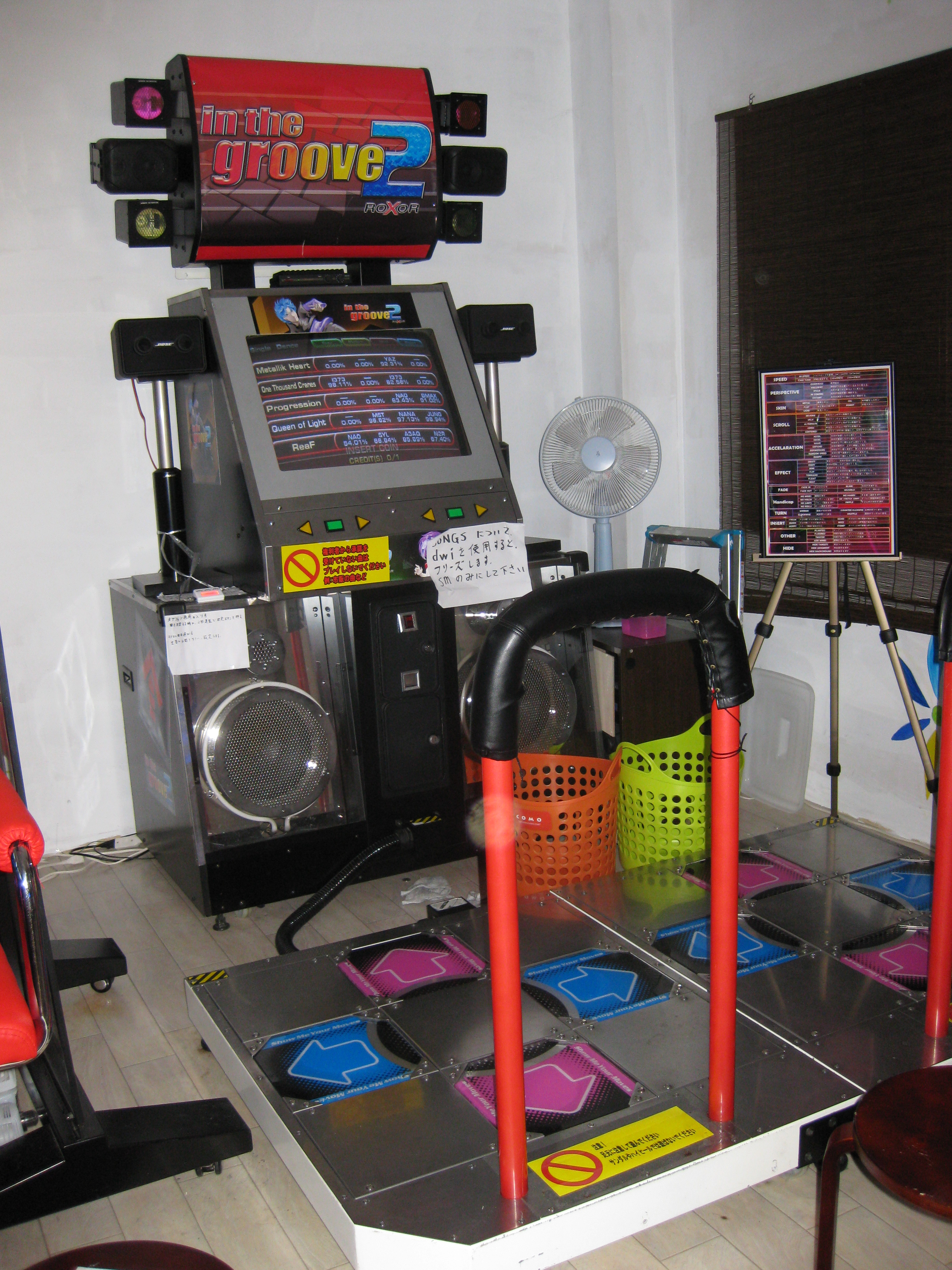 In The Groove参考写真